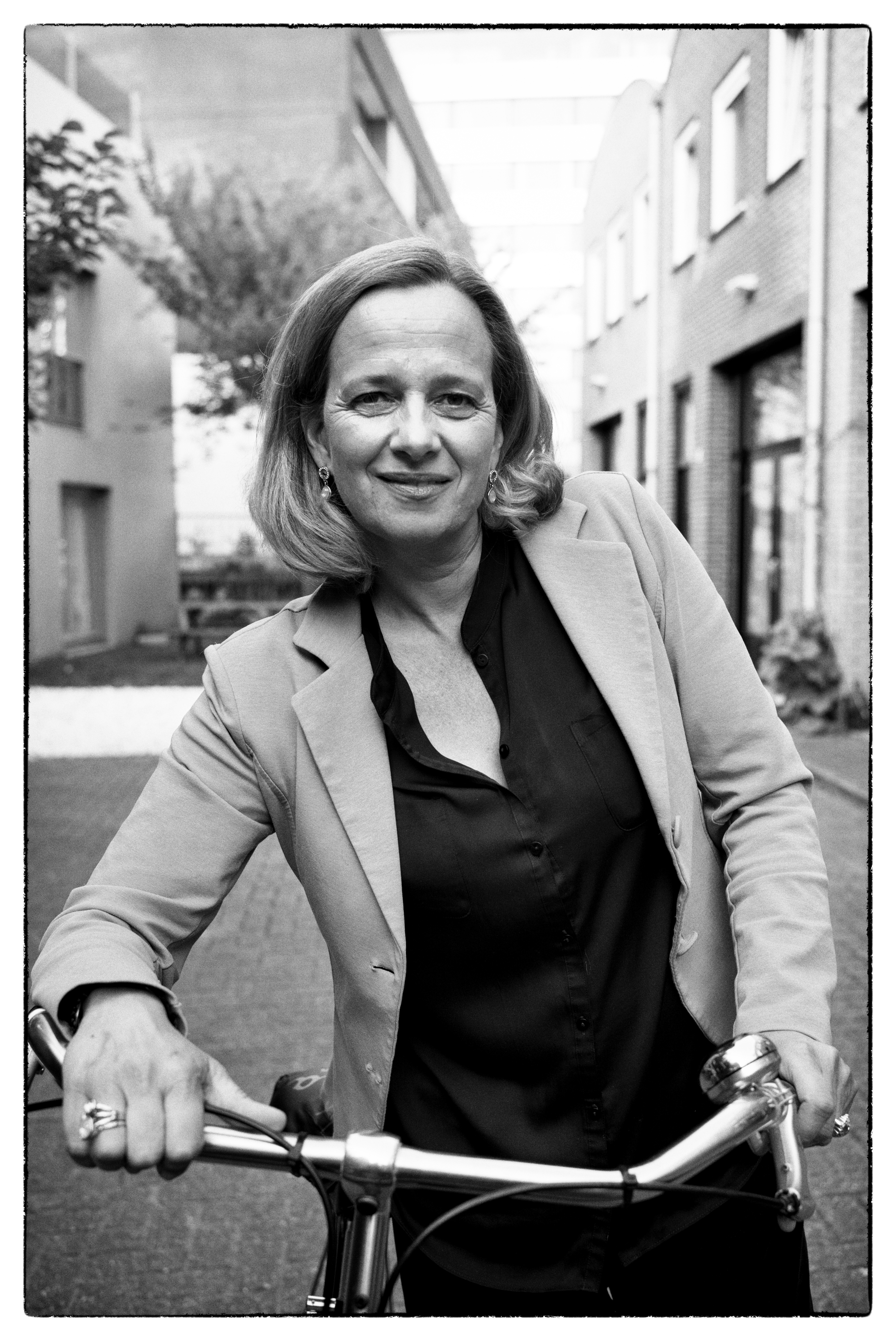 Lousewies van der Laan